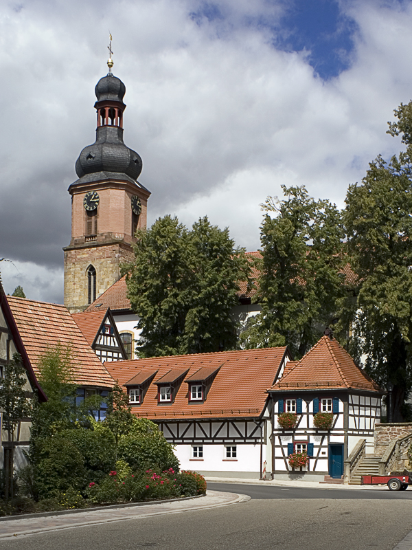 Die Dorfkirche Sankt Michael in Rheinzabern